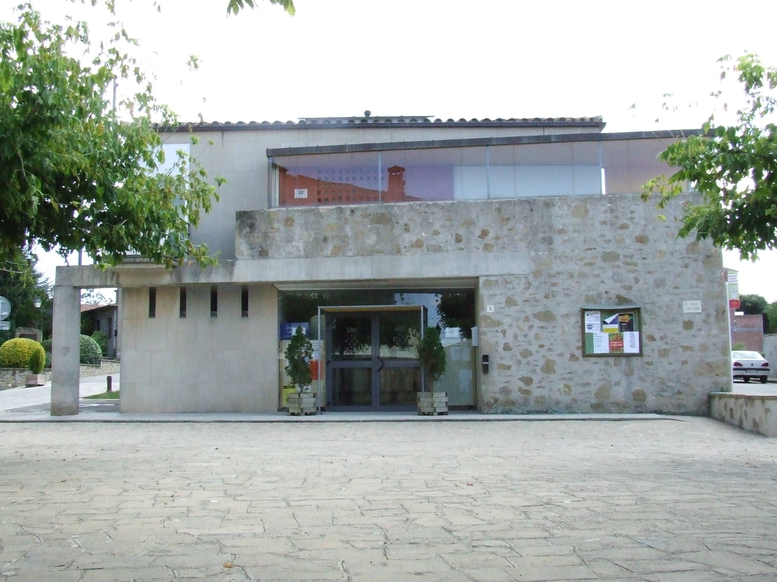 La Casa de la Vila de Castellcir (Moianès)